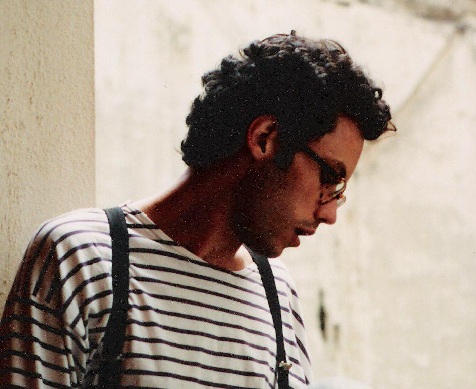 French writer Denis Lachaud